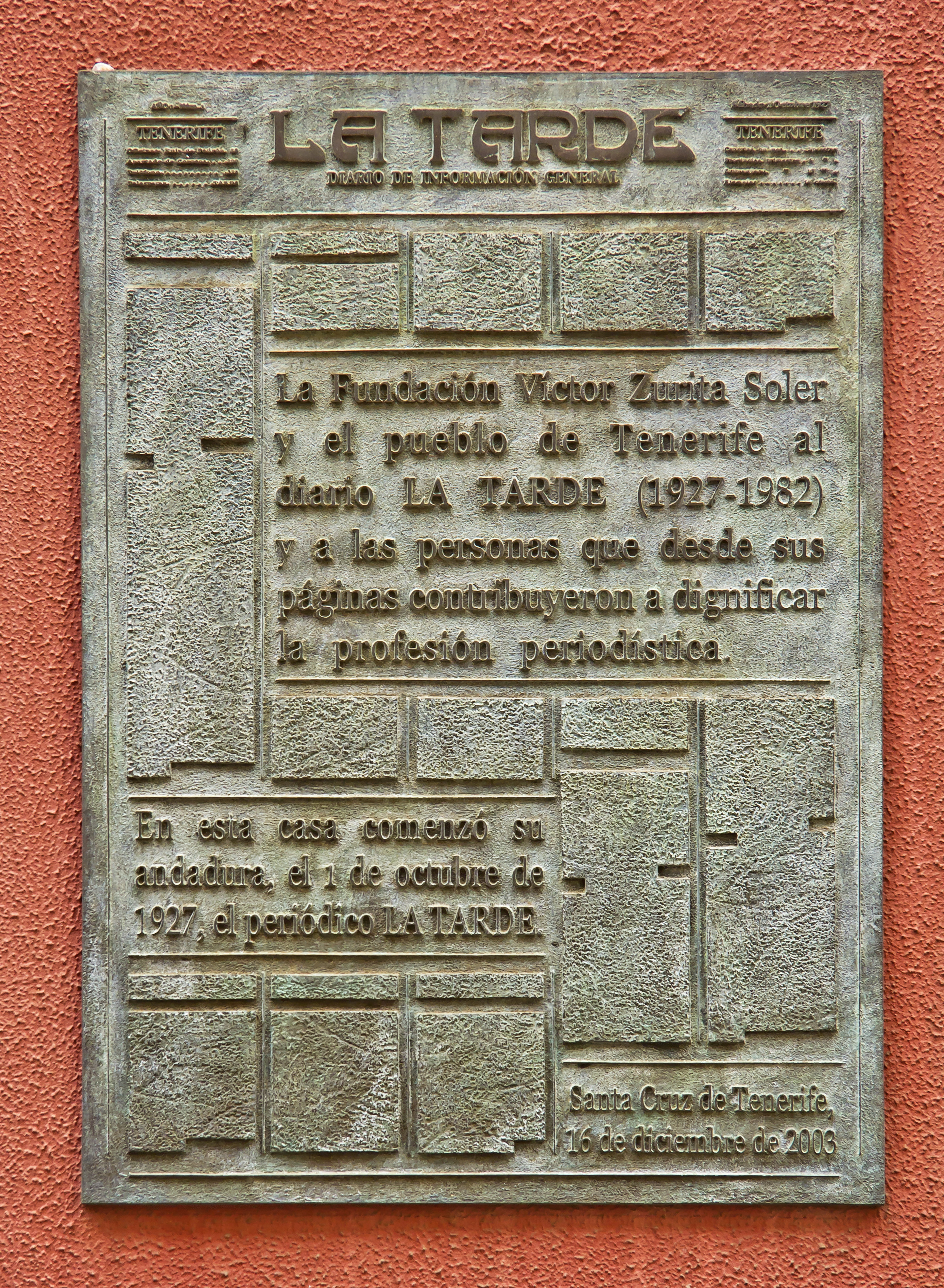 Placa conmemorativa en la calle Ruiz de Padrón en Santa Cruz de Tenerife